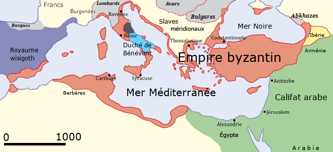 Carte du monde méditerranéen vers 650